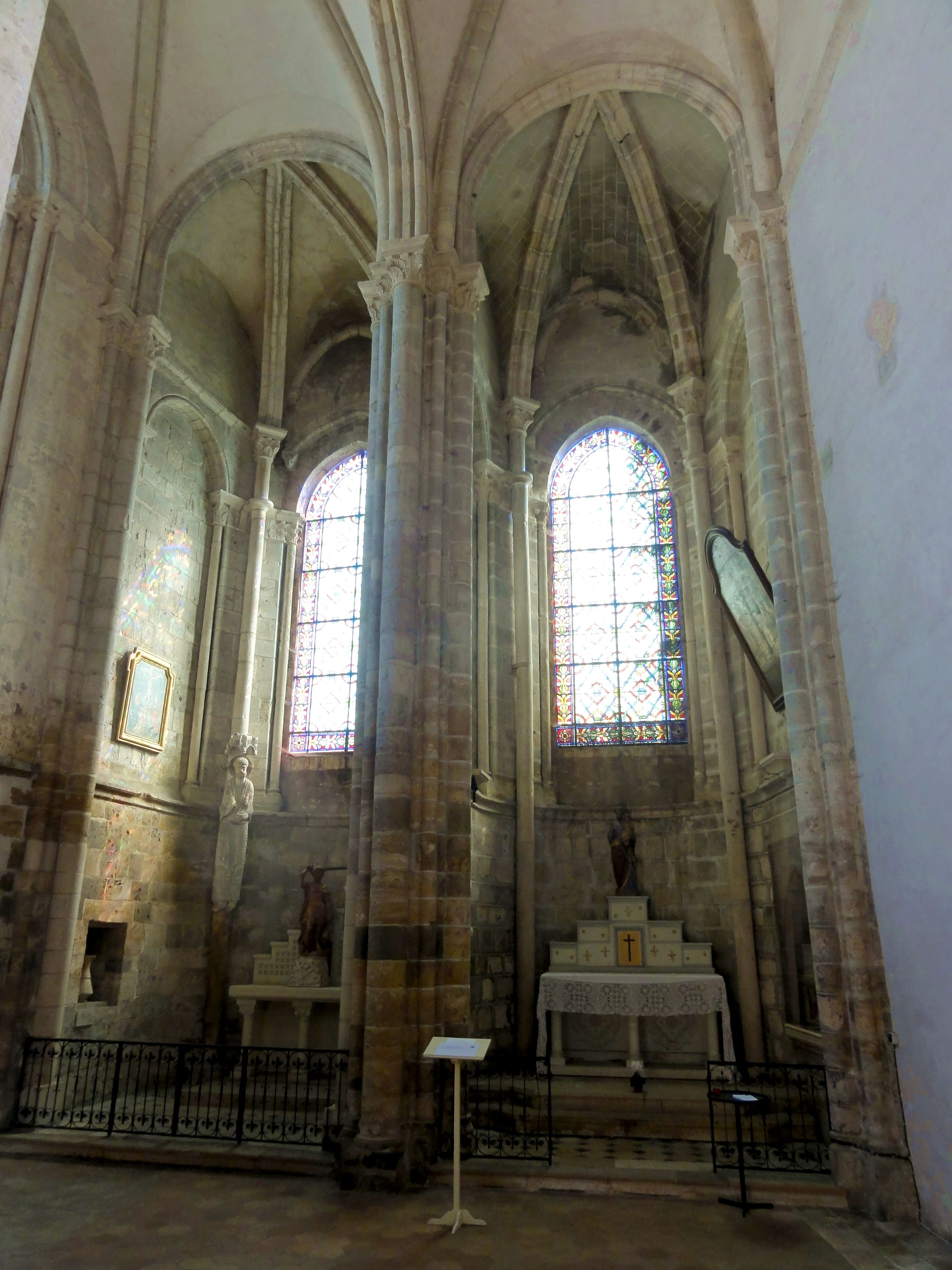 Collatéral nord, vue vers l'est.